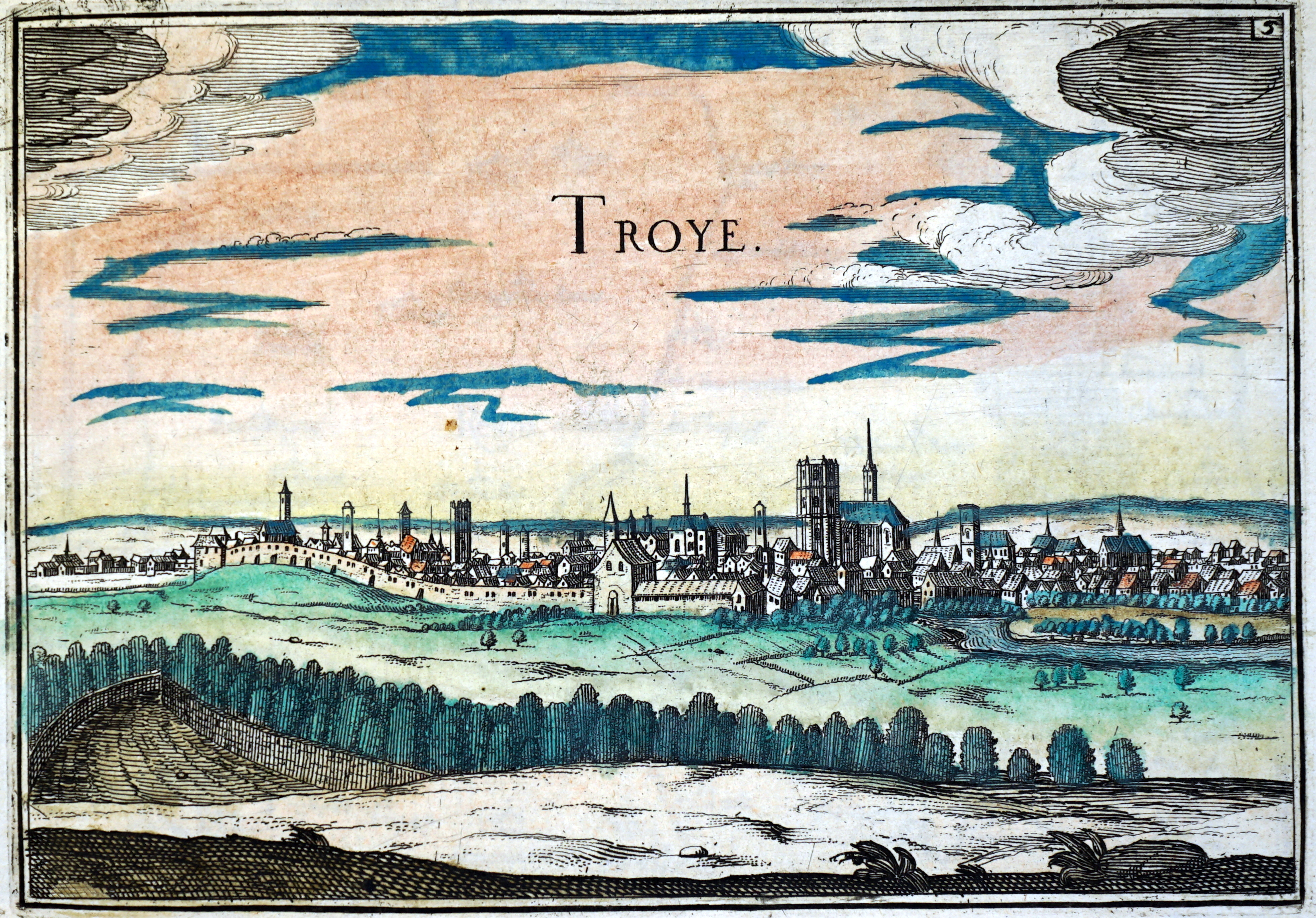 dessin provenant de plans et profils de toutes les principales villes et lieux considérables de France de C. Tassin.